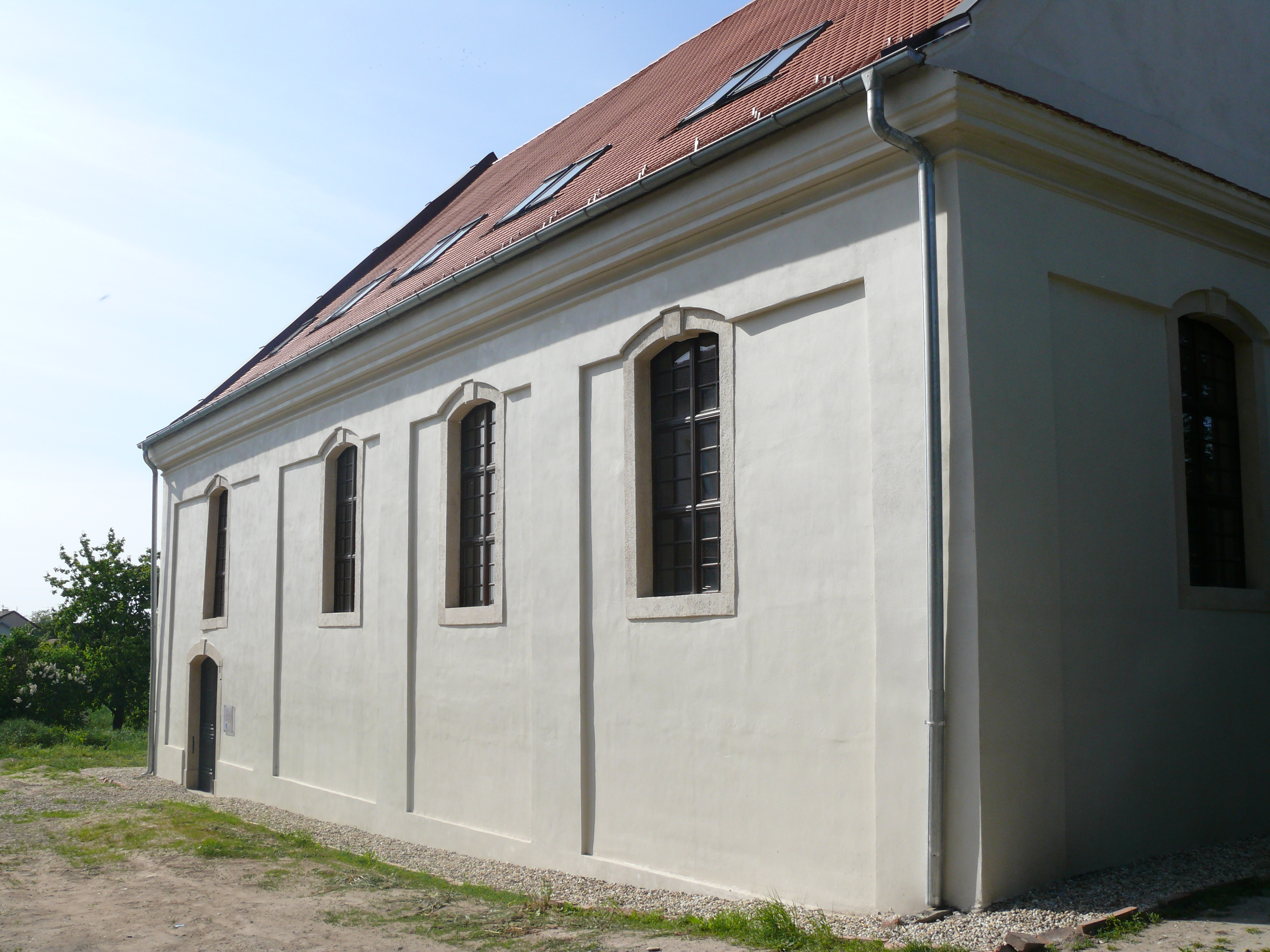 Zrenovovaná synagoga v Stupave